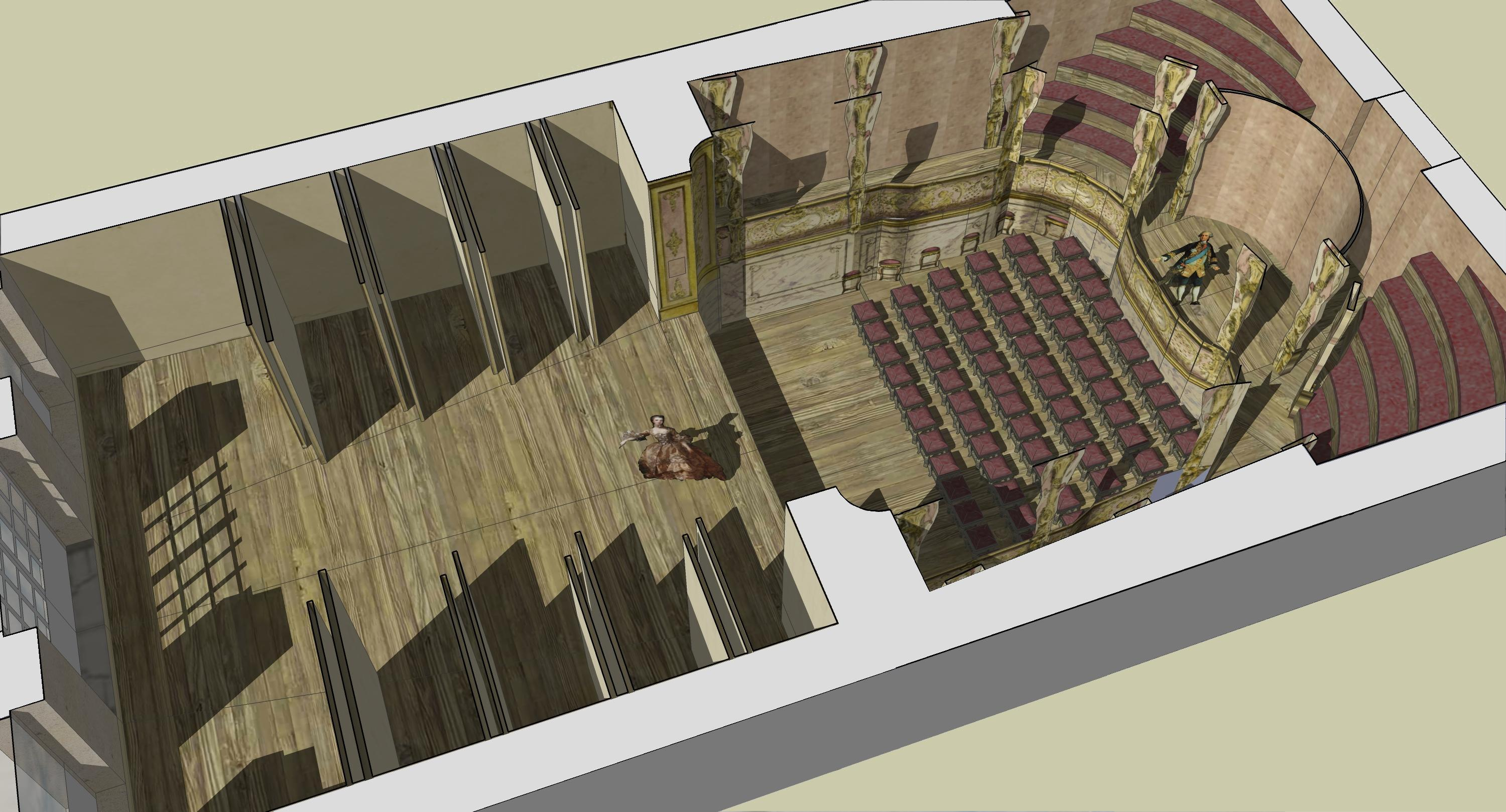 Schéma restituant le volume du théâtre de Bellevue, 1750-1757. par Franck Devedjian (publié dans la revue Versalia 2016).